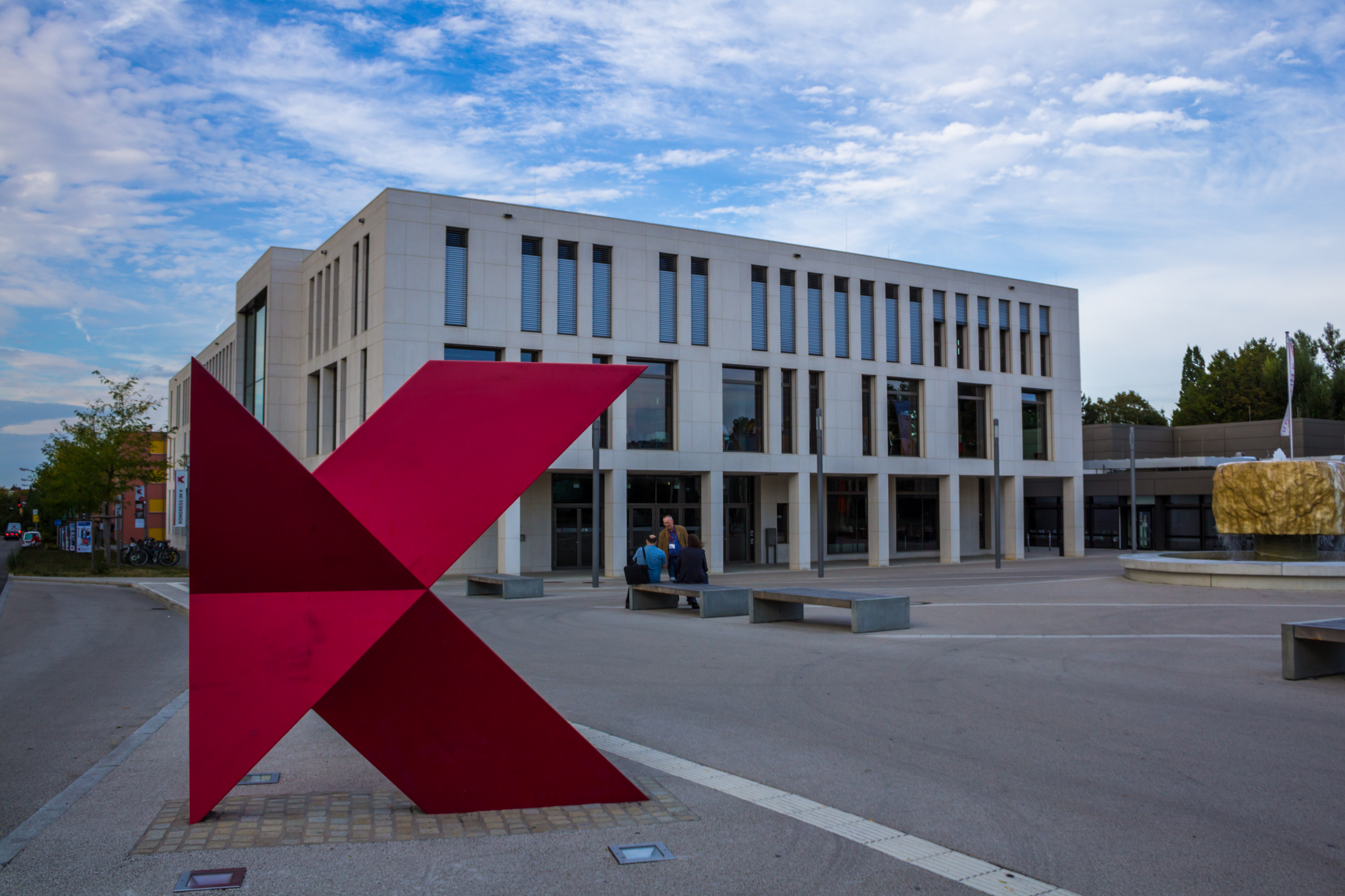 DasK, Veranstaltungsort der WikiCon 2016